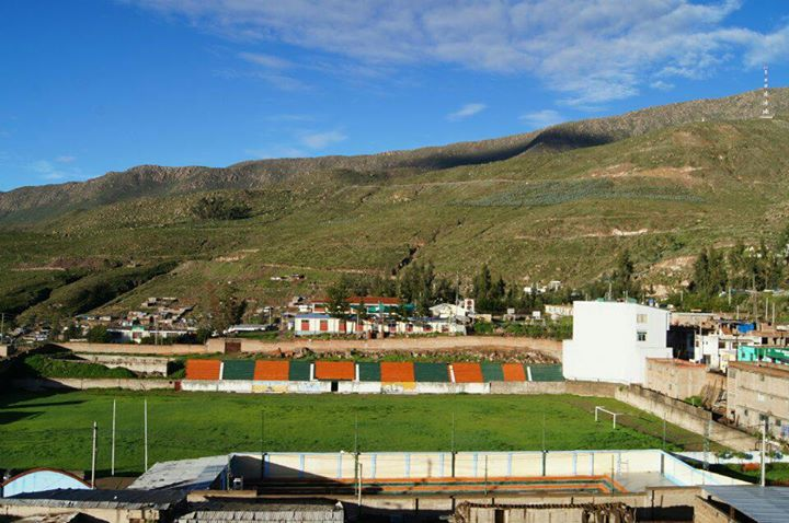 Vista del Estadio Los Estudiantes en la localidad de Chuquibamba